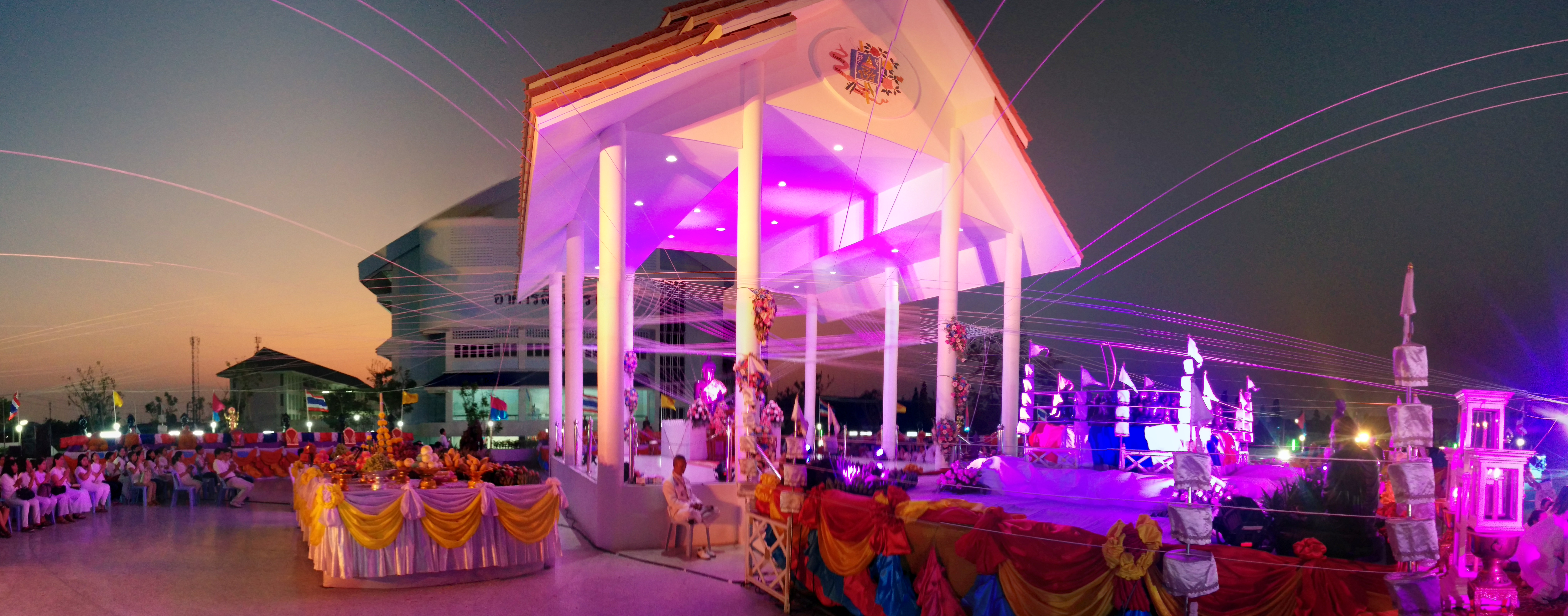 พิธีมหาพุทธาภิเษกเพื่อประดิษฐานหลวงพ่อสวนกุหลาบ วันที่ 3 มีนาคม 2558